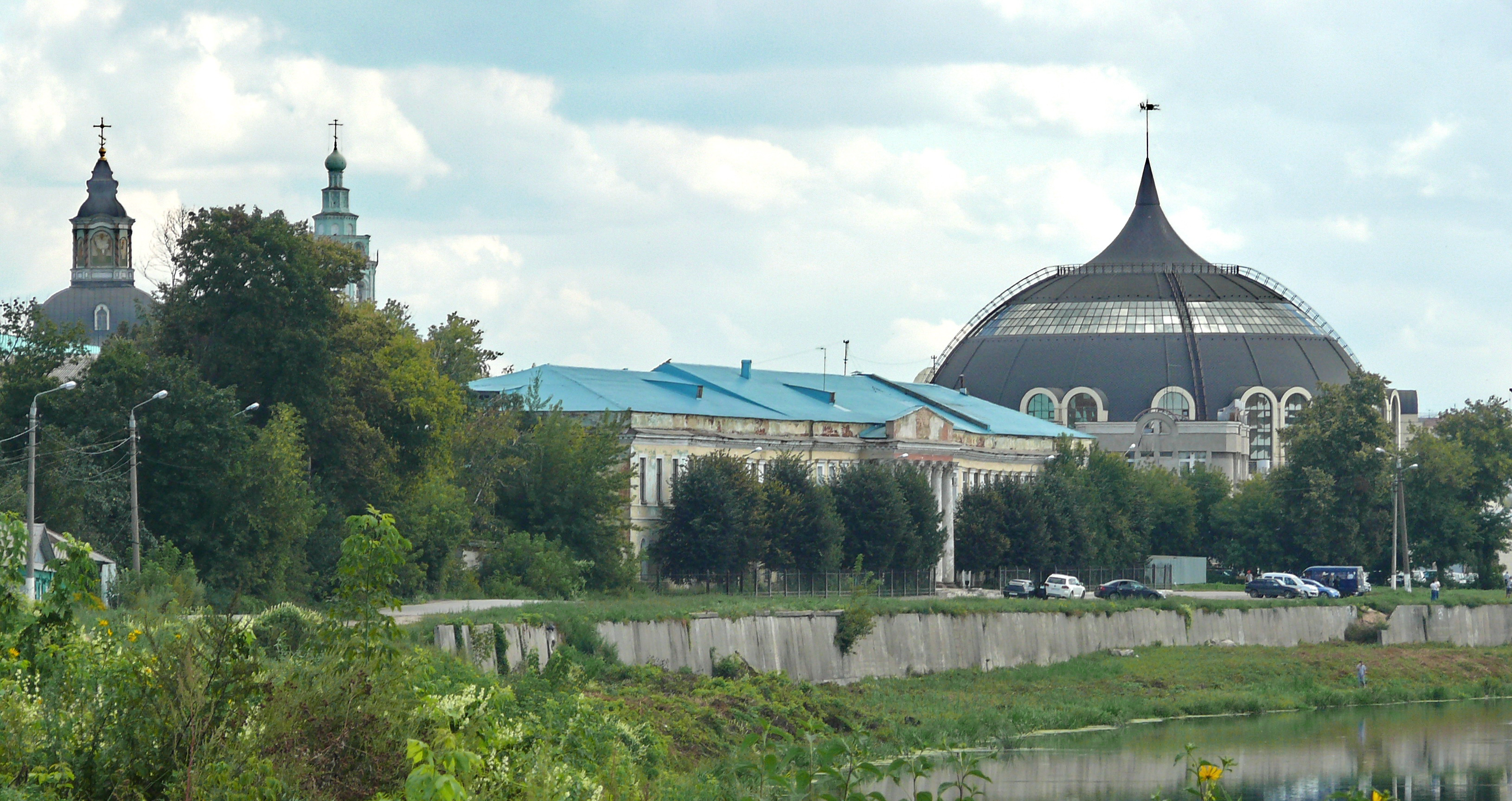 Усадьба (дом) Баташова А. Р. (училище военное Александровское) (Тульская область, Тула, Дрейера наб., 14 (лит. А, Б[1], а, а[3], а[6], а[7], А[i], А[2], А[3], А[4], А[5], А[6]))